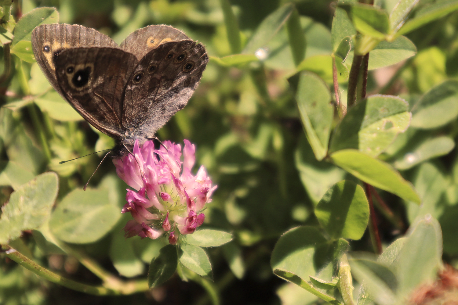 Bild på fjärilen, sittandes på ett klöver